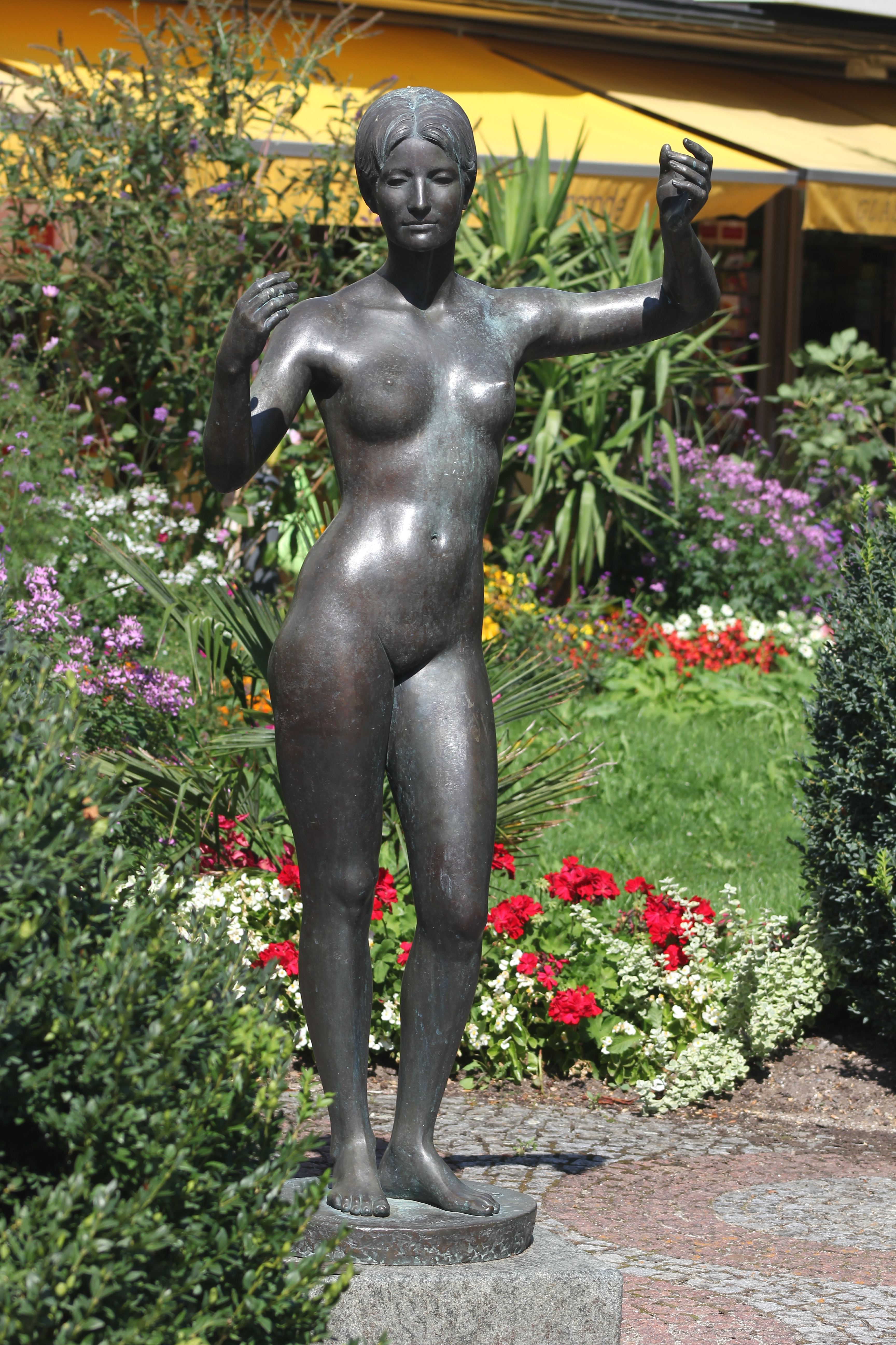 „Innere Harmonie“, Aktstatue von Heinrich Faltermeier (1982/83) in Bad Wörishofen am Kurhaus, Luitpold-Leusser-Platz Ecke Bonifaz-Reile-Weg